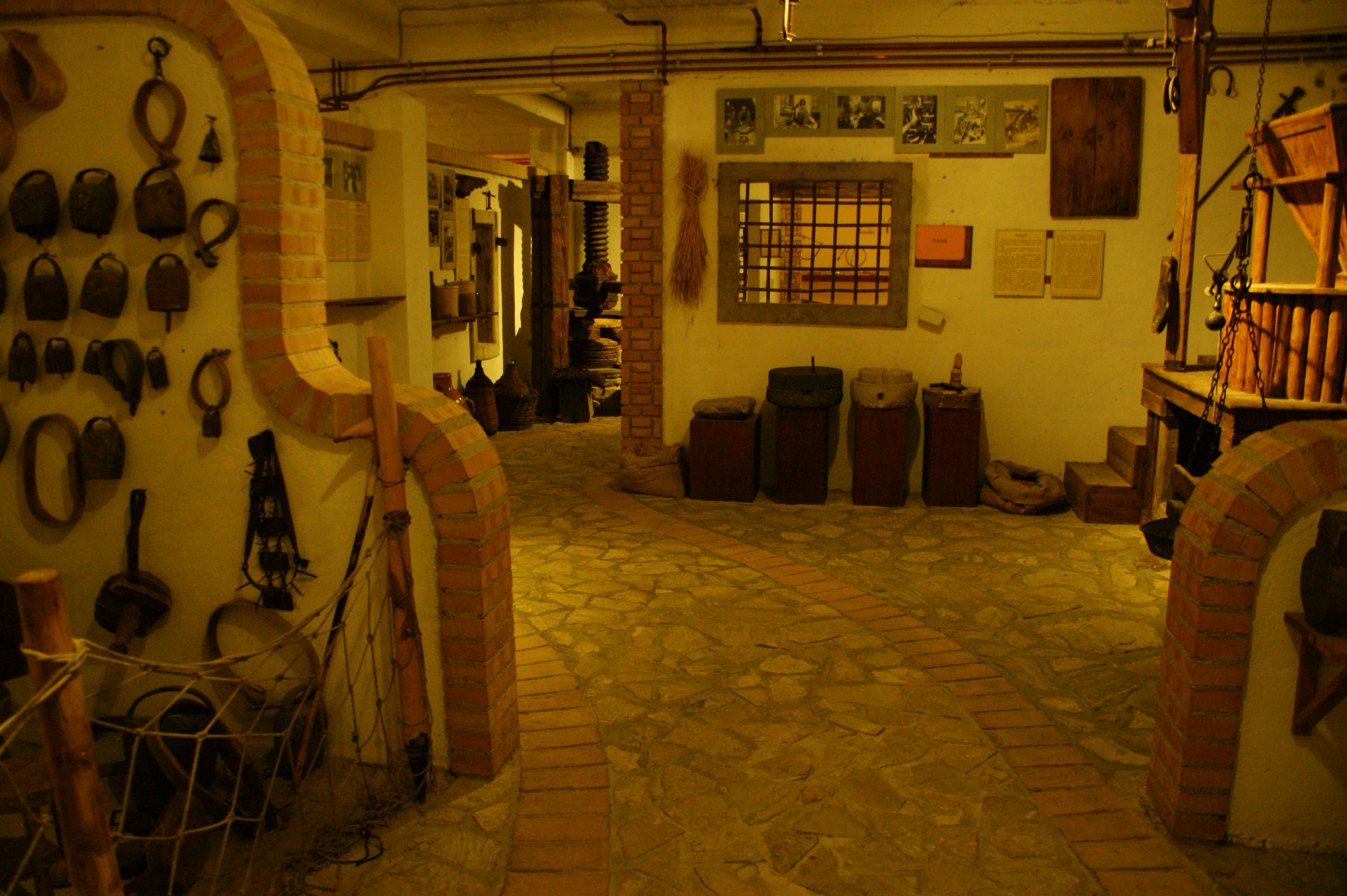 Un'ala del primo livello del percorso espositivo, con gli stand dedicati alle principali produzioni alimentari (foto: giugno 2014).